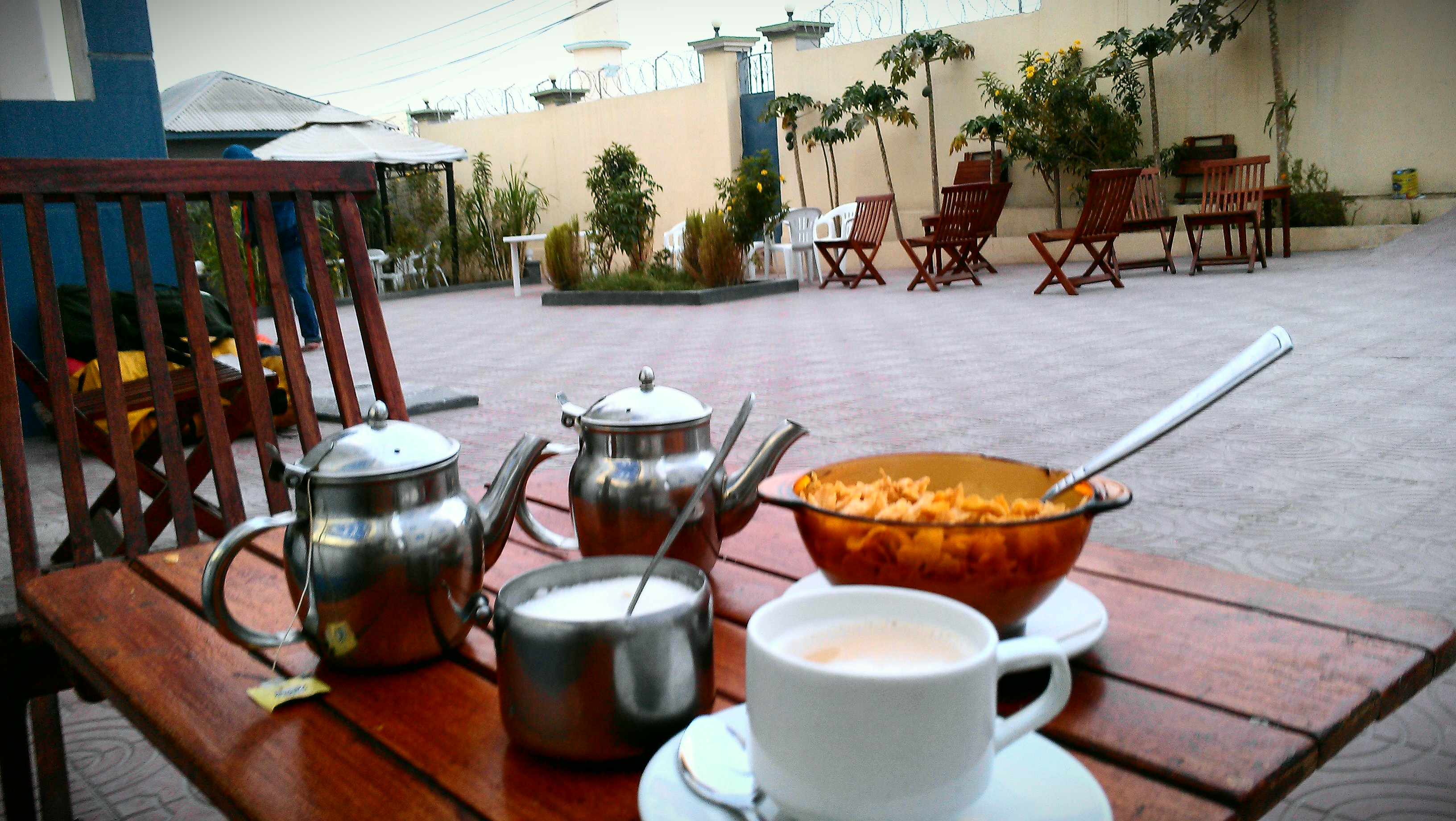 Somaliland